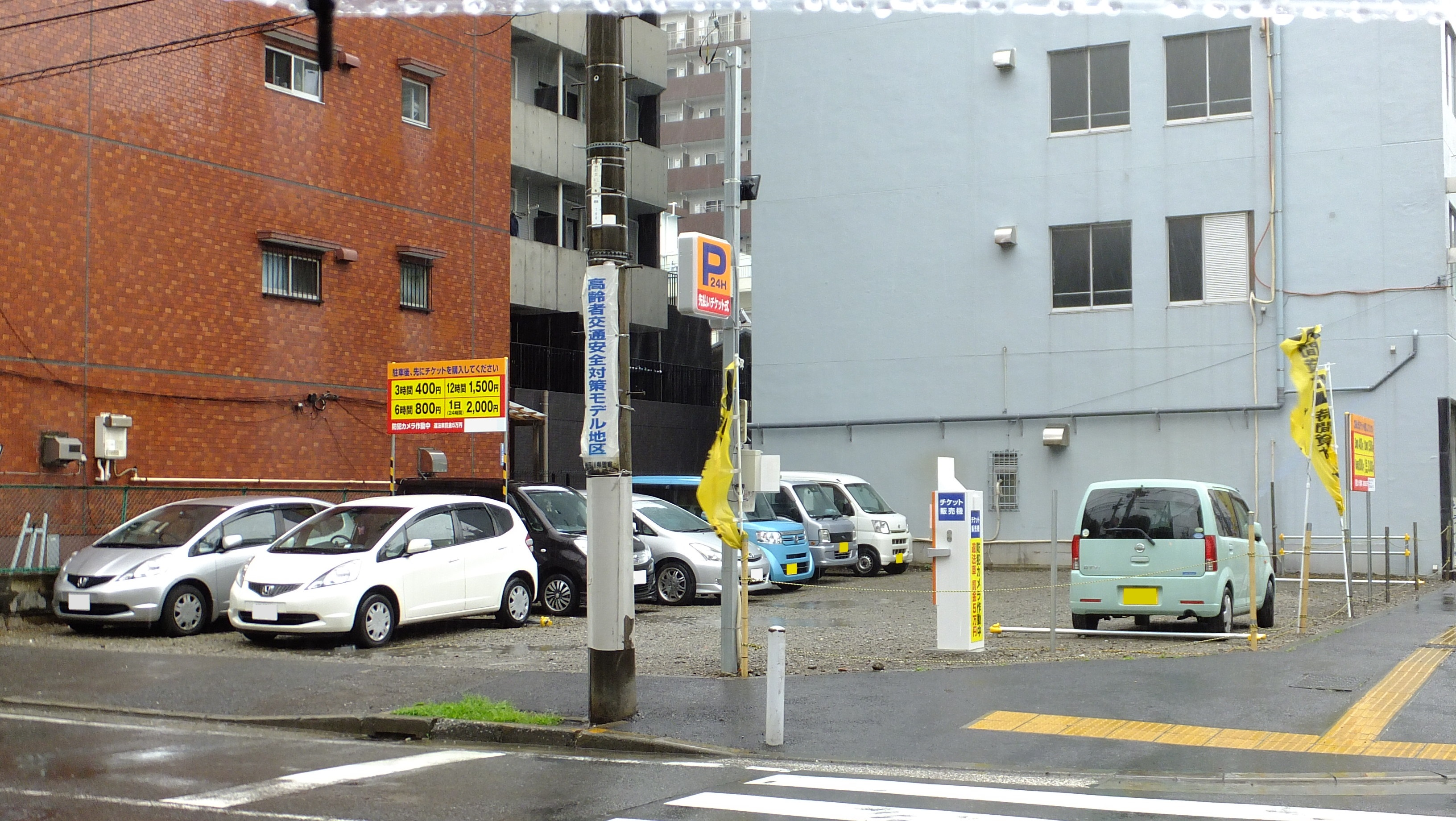 簡易設置のコインパーキング。 横浜市中区内にて。